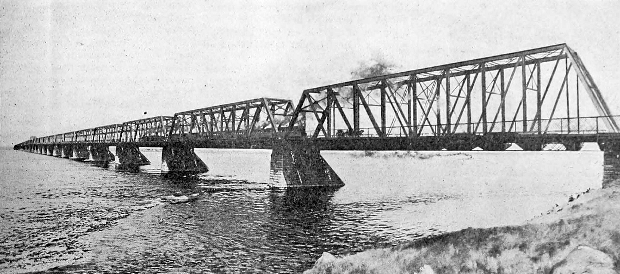 Victoria Bridge, Montreal, Canada